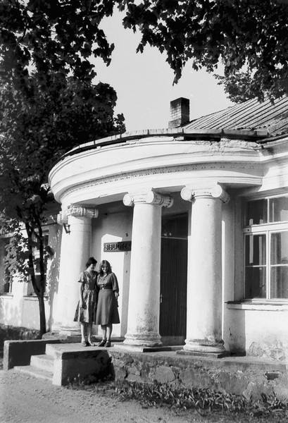 Okuličiūtės dvarelis, 1950-1975 m., Anykščiai